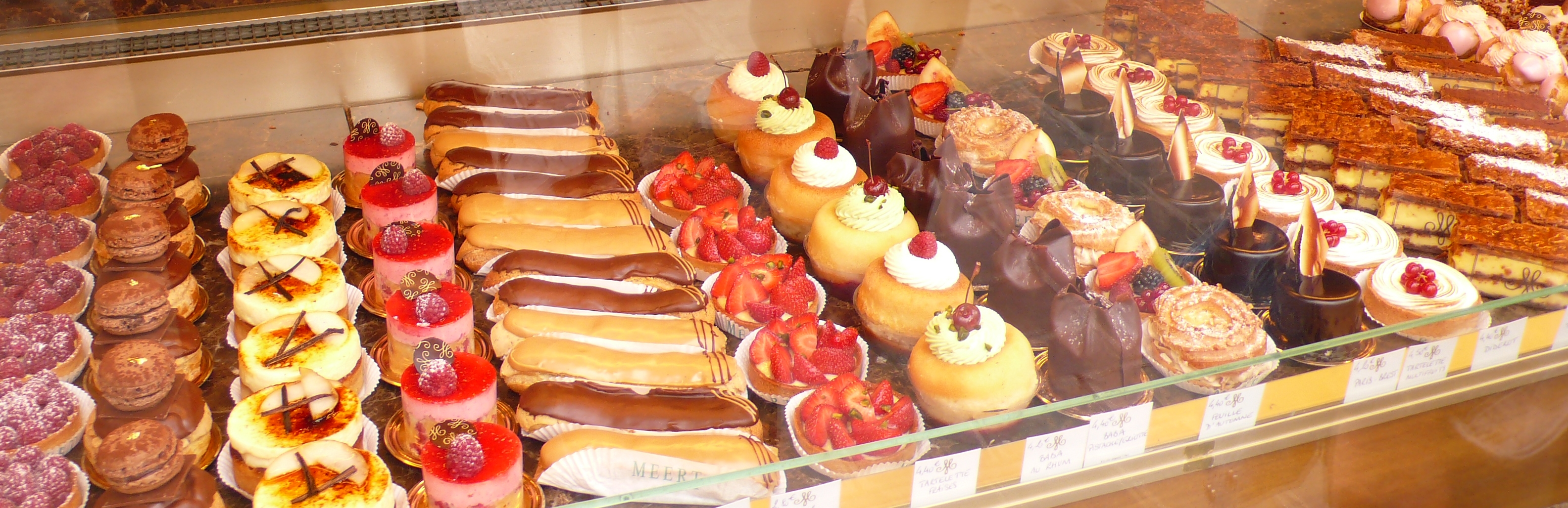 Lille, Pâtisserie Meert, Rue Esquermoise.